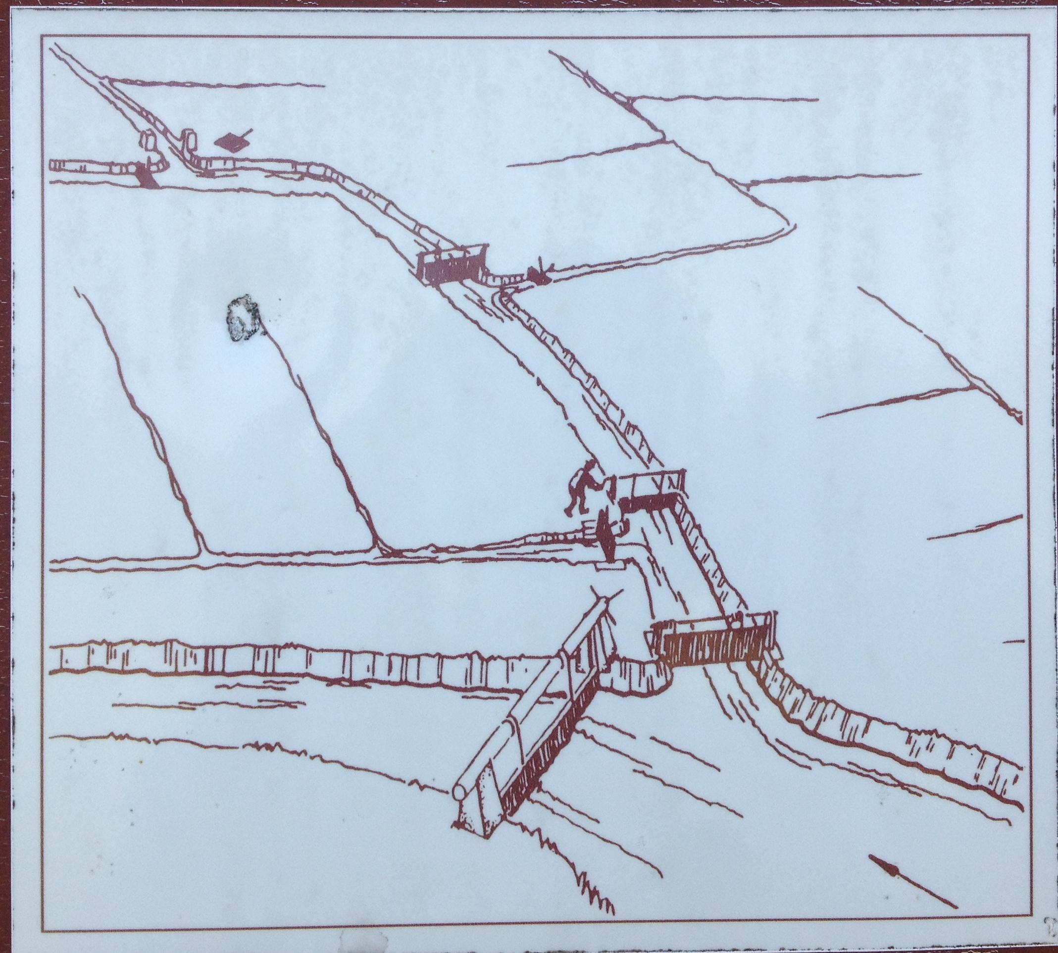 Darstellung des Prinzips des Wässerns, aufgenommen von einer Informationstafel in den Melchnauer Wässermatten